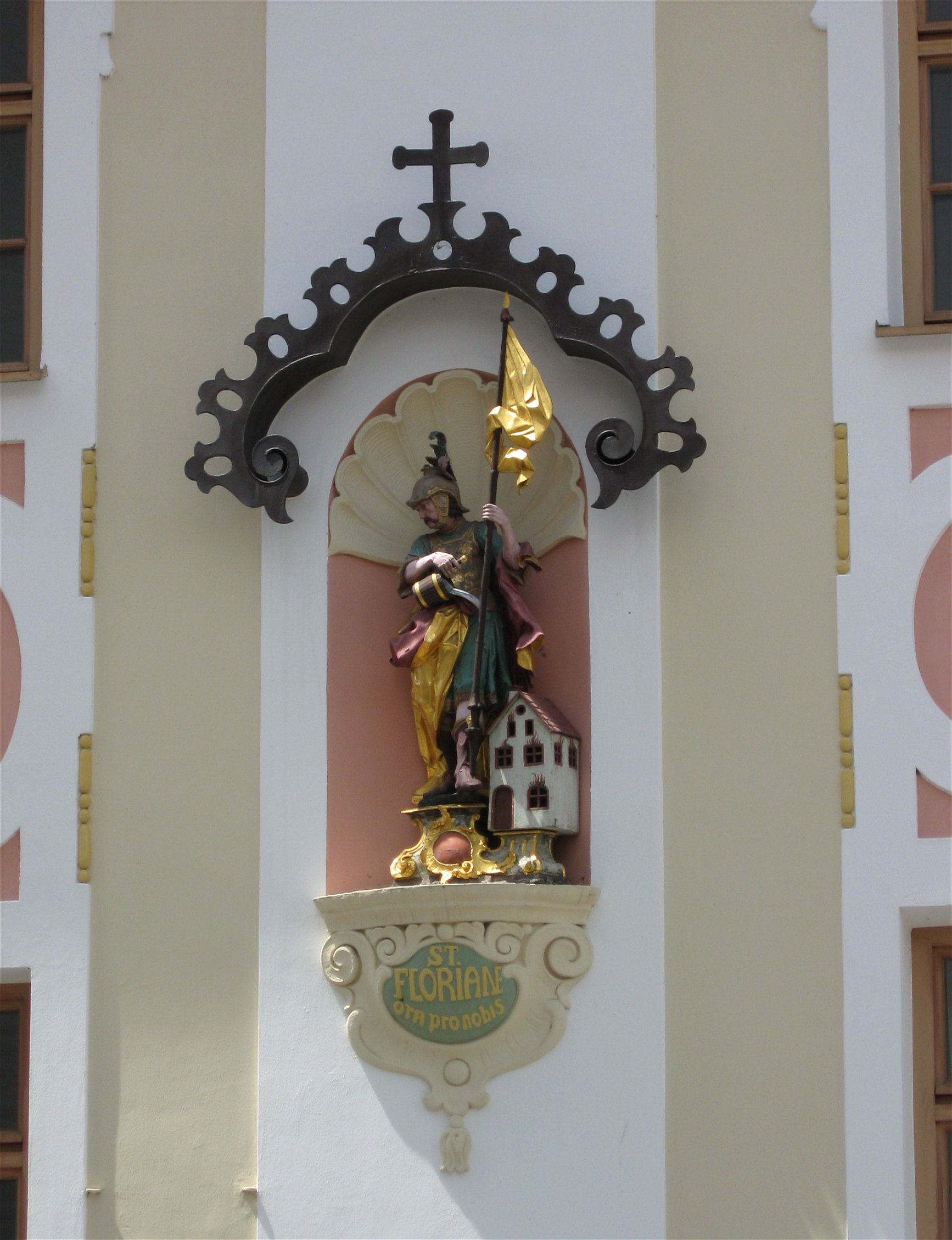 Ludwigstraße 167; Pfarrhaus, dreigeschossiger, einseitig abgewalmter Traufseitbau mit neubarocker Fassadengestaltung und dreigeschossiger Abseite mit Arkaden, im Kern um 1380, über zwei mittelalterlichen Anwesen mit Abseite neu errichtet 1694/95, Fassadengestaltung Anfang 20. Jahrhundert, Umbau 1986/87; mit Ausstattung; Hausfigur, Holzfigur des Hl. Florian, um 1750, Farbfassung 1986. D-1-81-130-264